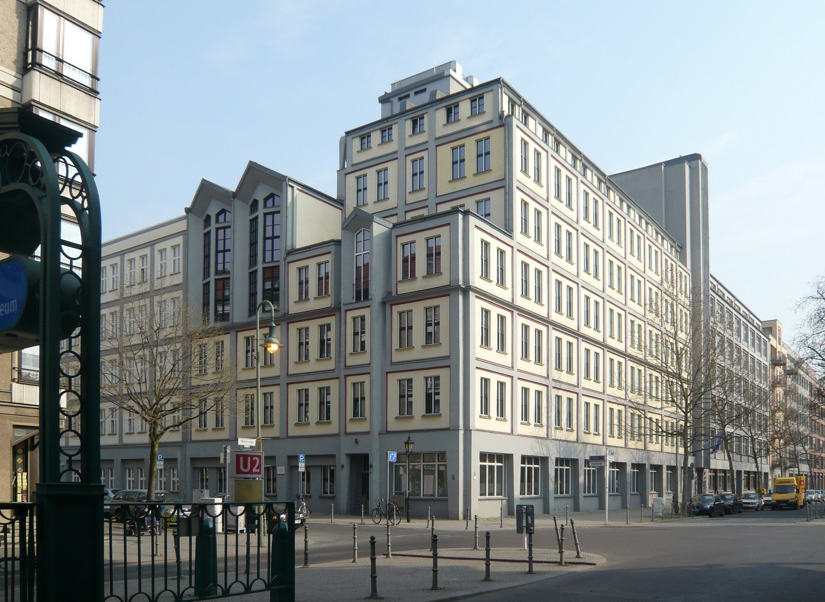 Berlin-Mitte; Inselstraße, Baudenkmal Gewerkschaftshaus (1)